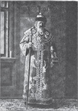 фотография сделана около 1868 года